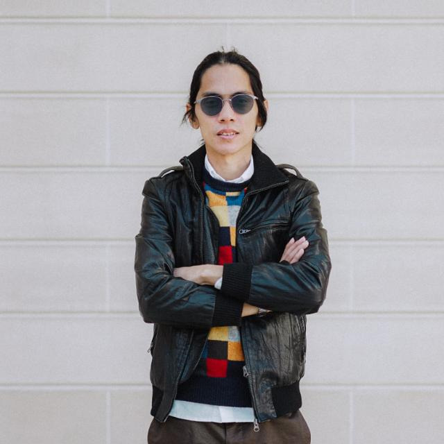 Angga Sasongko